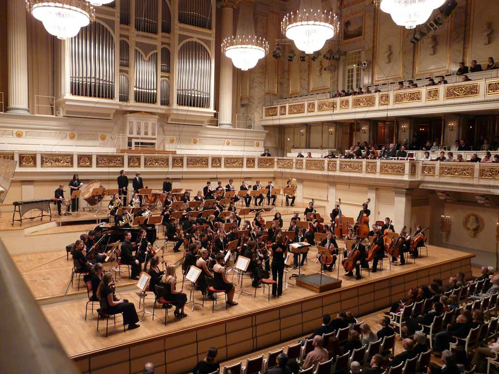 Großer Saal - Konzerthaus am Gendarmenmarkt, Berlin